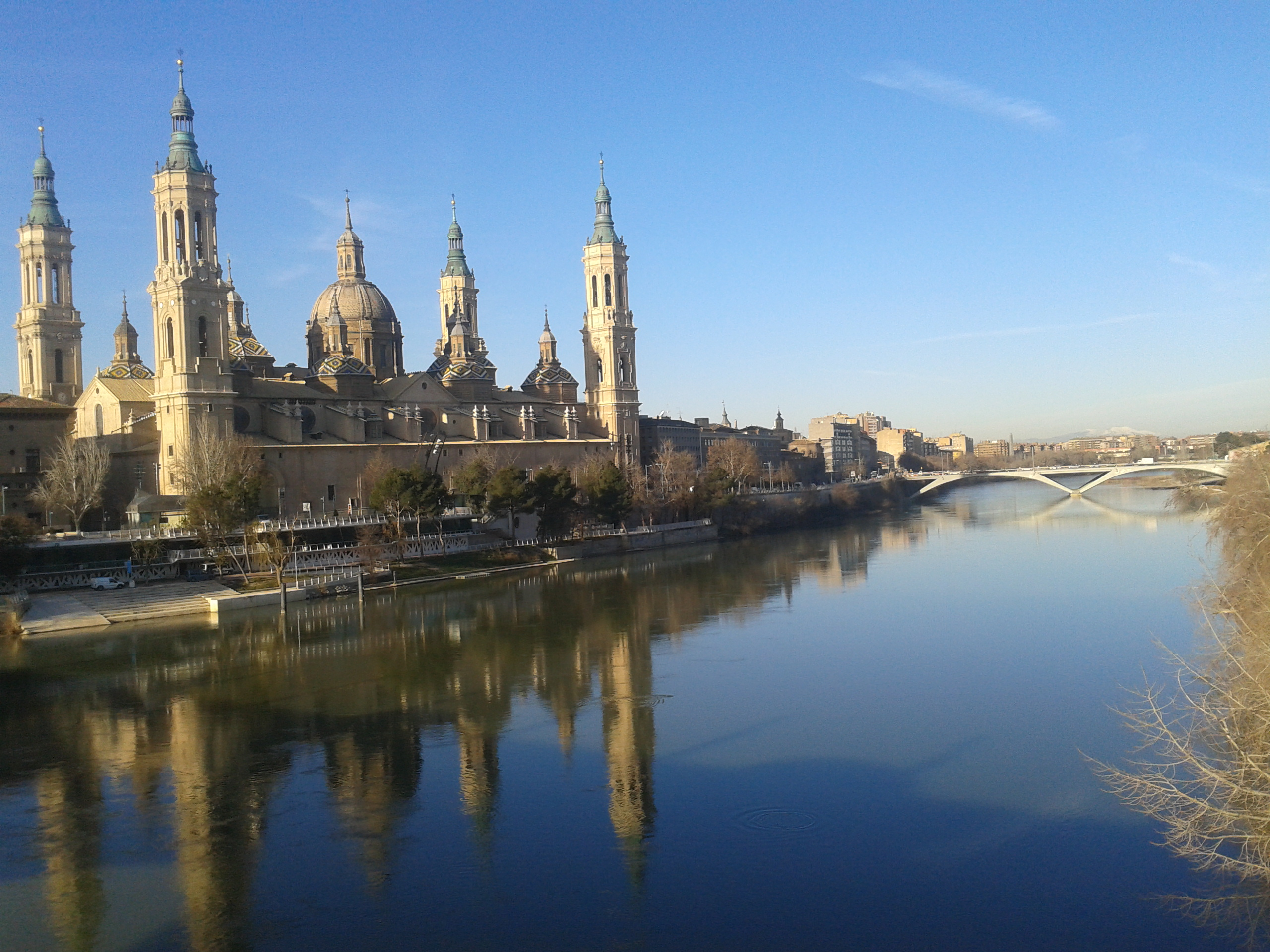 Iglesia Magistral de Nuestra Señora del Pilar